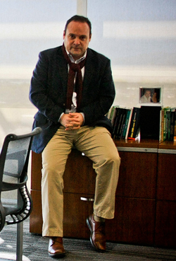 Alberto Uribe Camacho